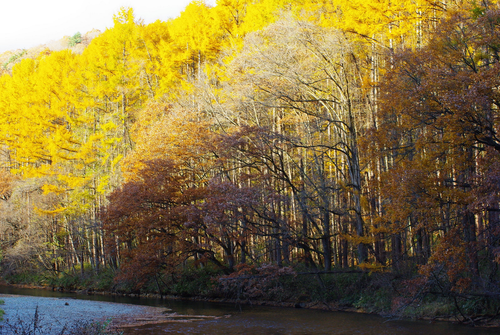 丹藤川 Tando river